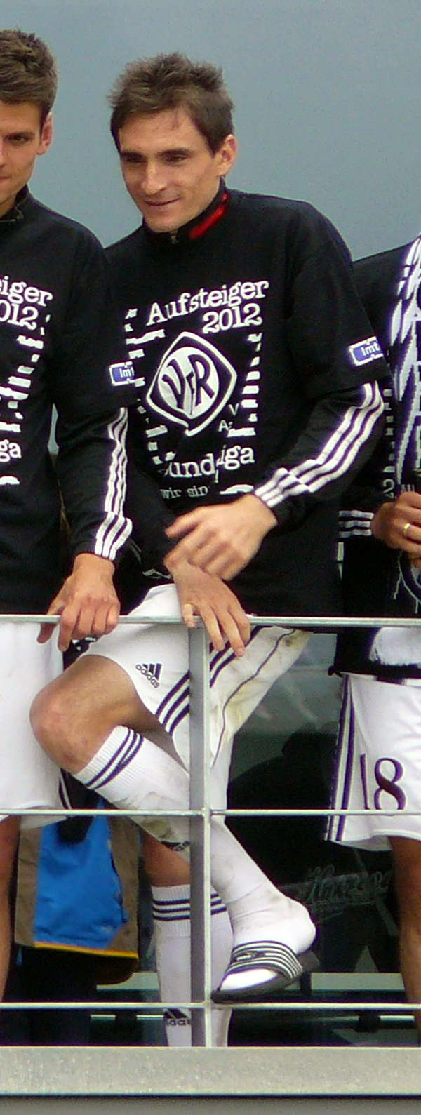 Marco Haller bei der Aufstiegsfeier des VfR Aalen am 5. Mai 2012